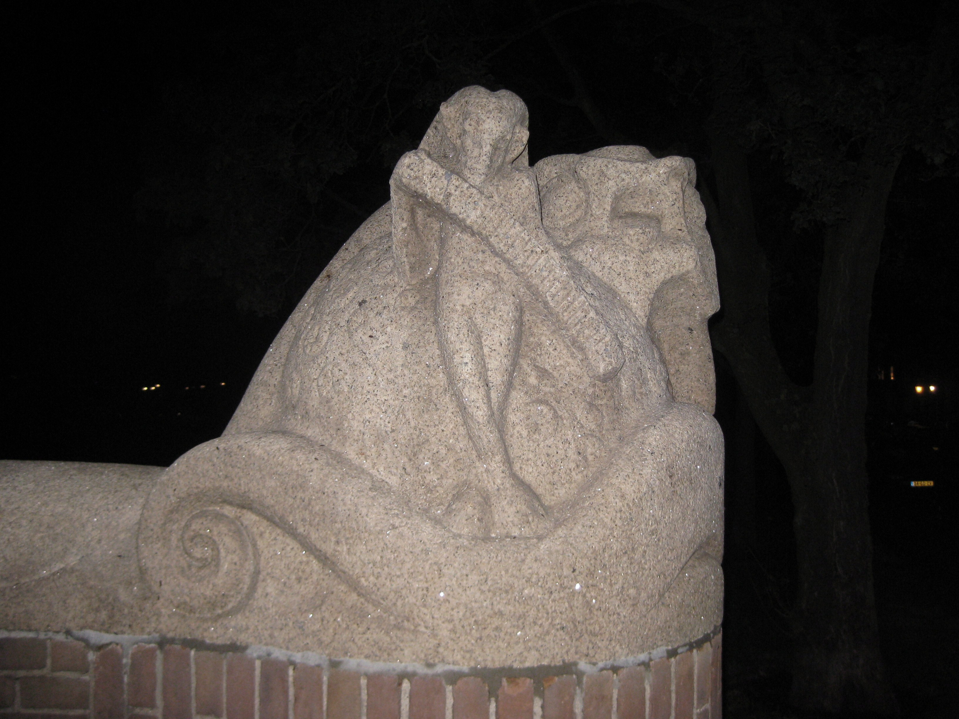 Faun met harmonika 1926 van Hildo Krop bij Mozartbrug graniet